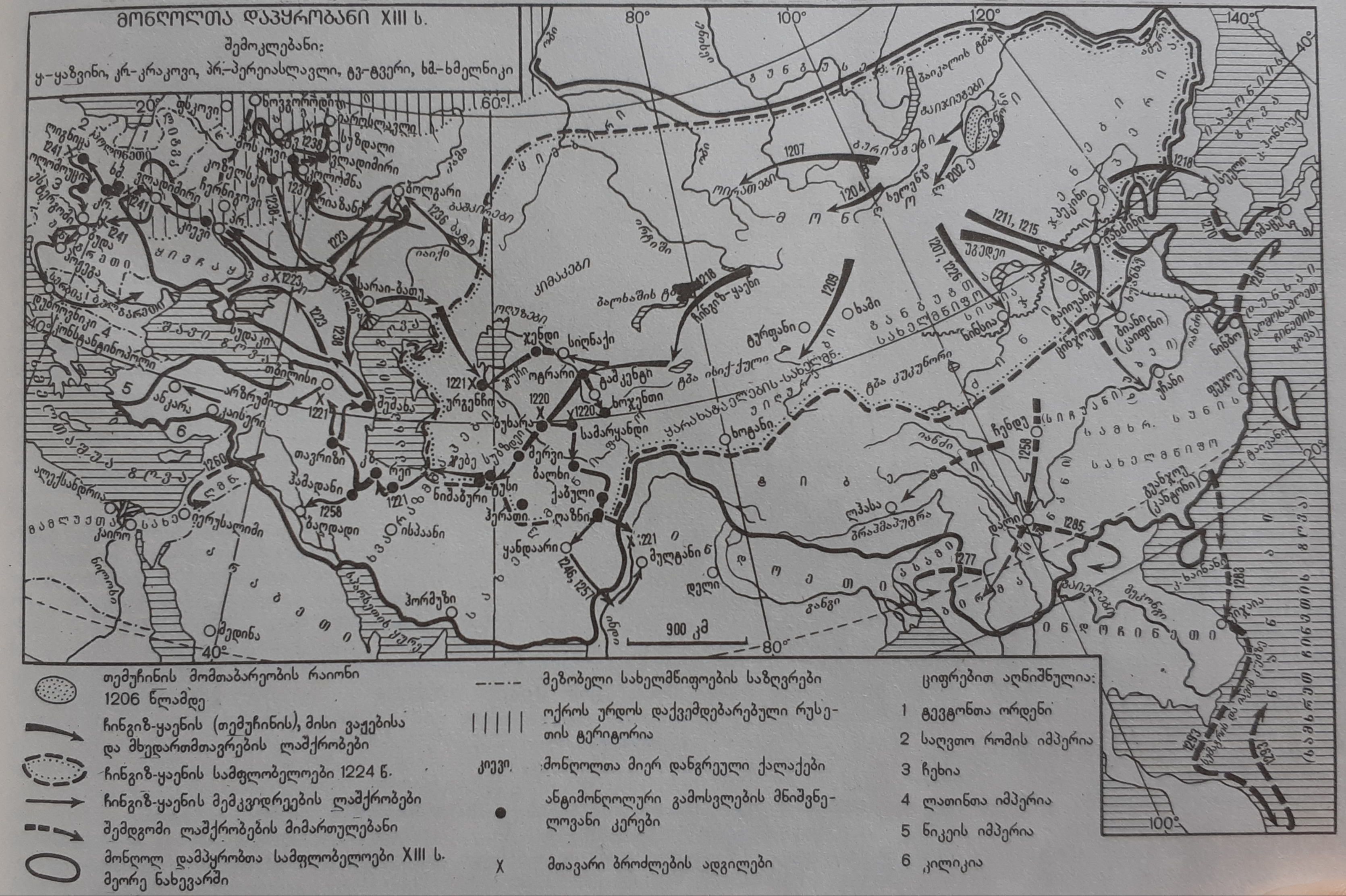 მონღოლთა დაპყრობანი XIII ს.